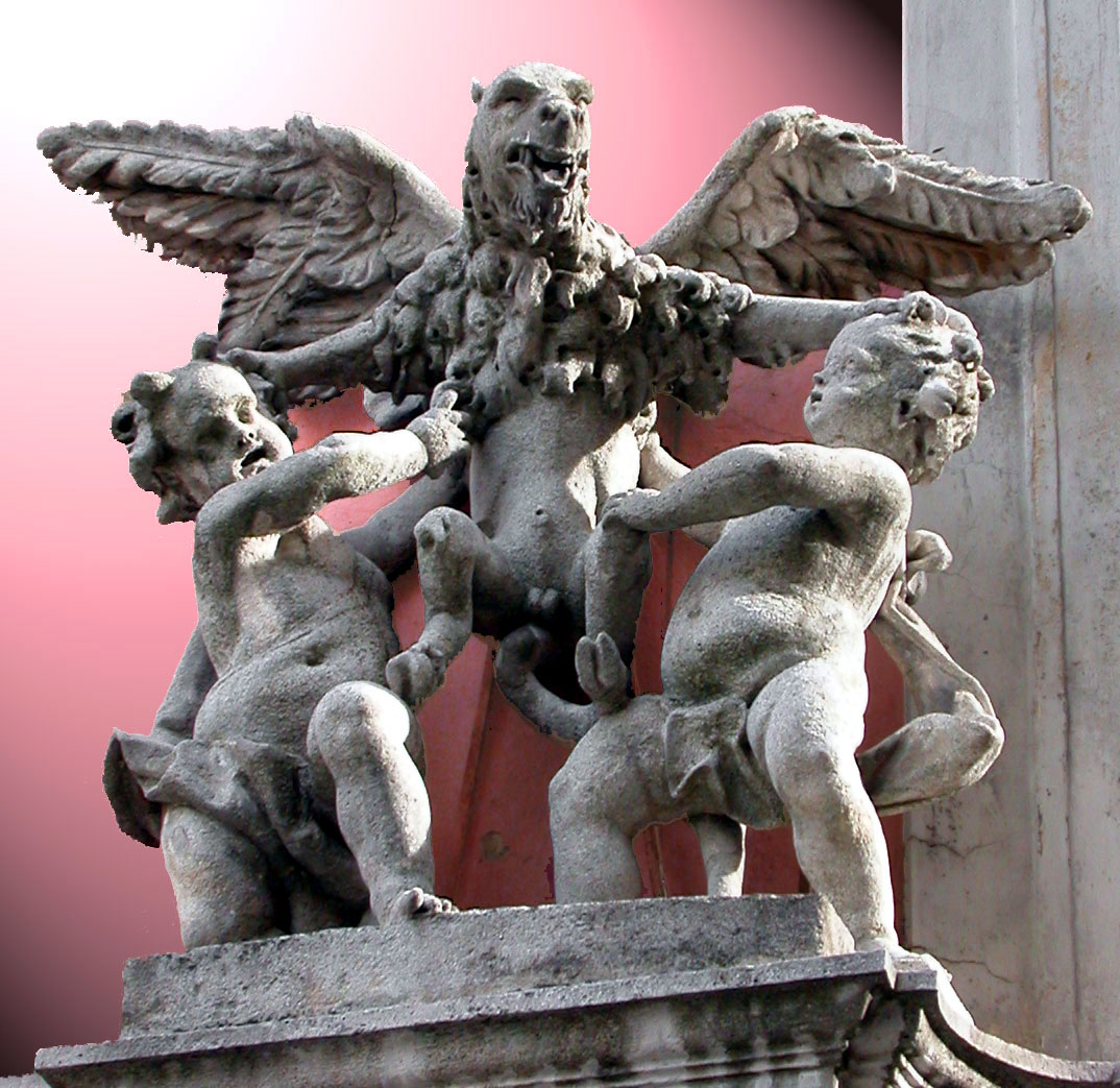 Allegorie mit Engeln Greif am Haus Kurrentgasse 12, 1010 Wien